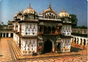 राम-जानकी मंदिर जनकपुर